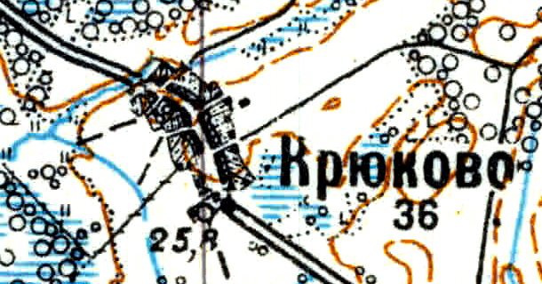 Топографическая карта Ленинградской области, квадрат Vc-29 (Батецкая), деревня Крюково